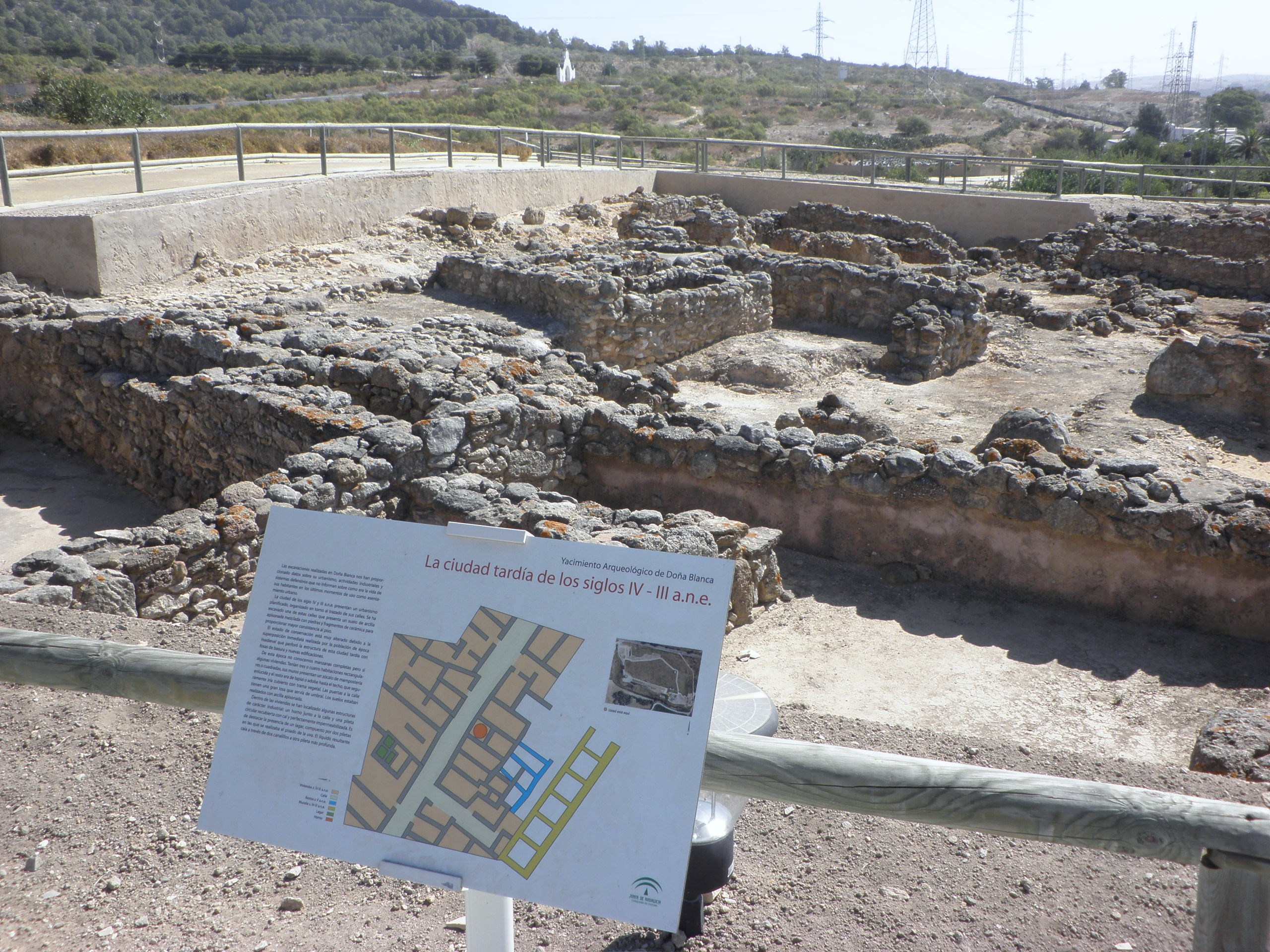 Yacimiento arqueológico de Doña Blanca, El Puerto de Santa María, España.